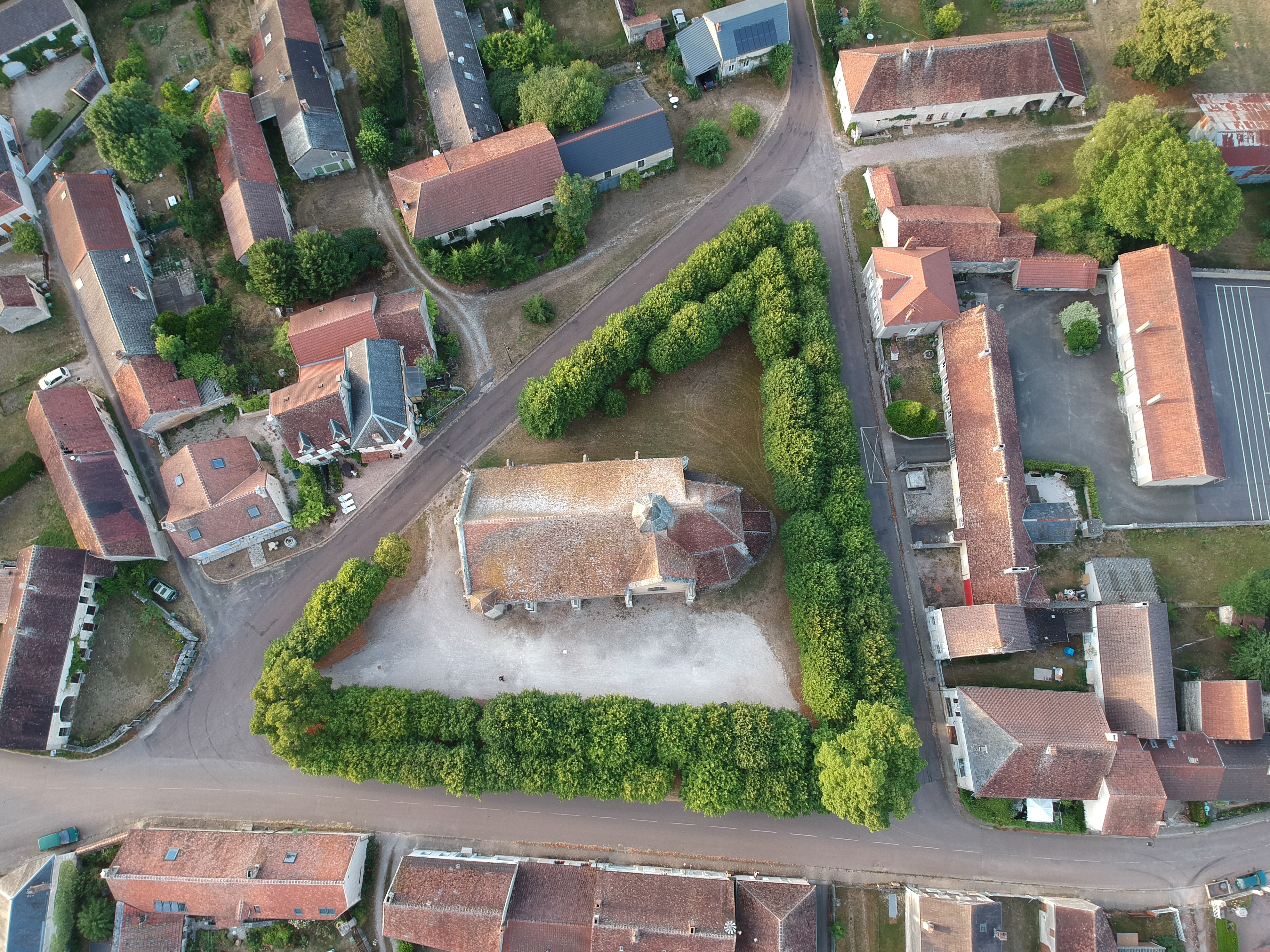 Image aérienne de Sougères-en-Puisaye en juillet 2018.